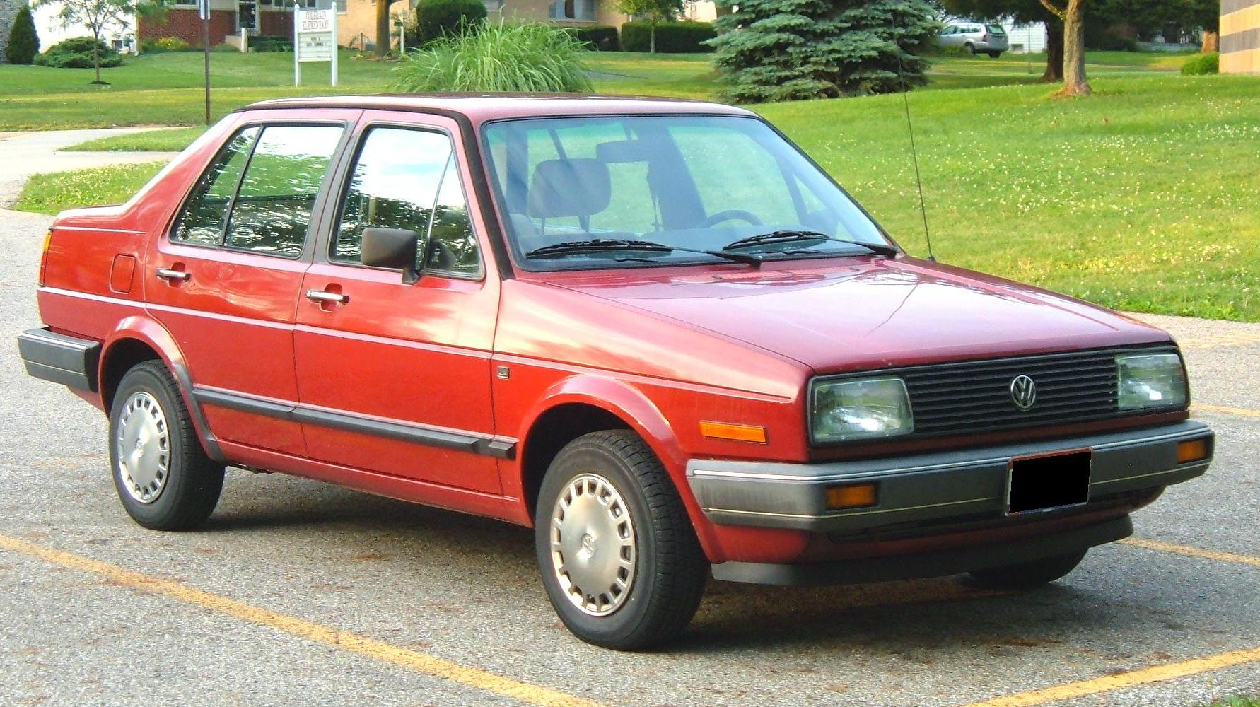 1985 Volkswagen Jetta MkII. U.S. Spec. 1.8L 4-cylinder gasoline.